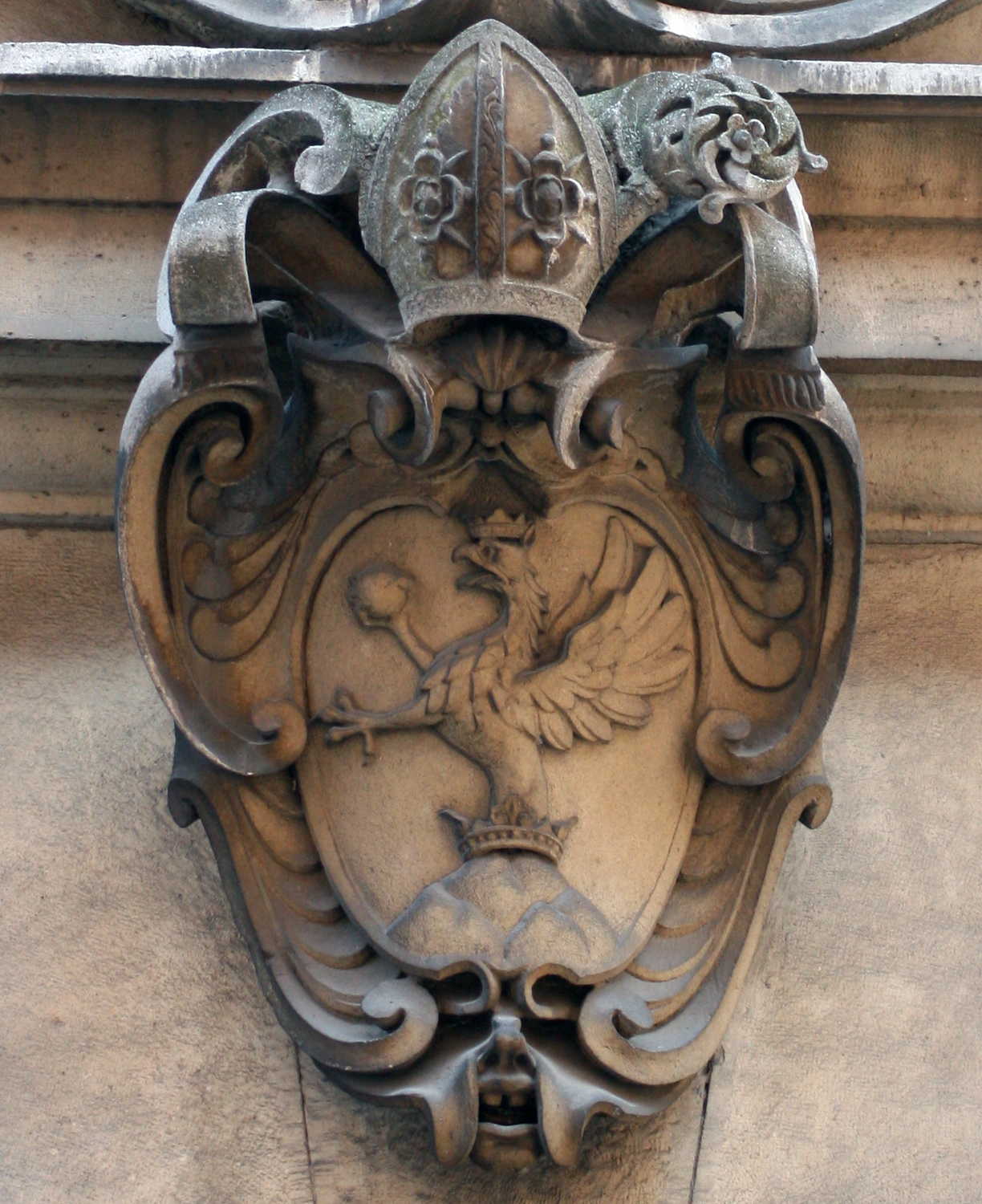 Erb prepošta Juraja Draskovicha, nad renesančným portálom, pred budovou prepoštva z roku 1637, na Kapitulskej ulici č. 19 v Bratislave